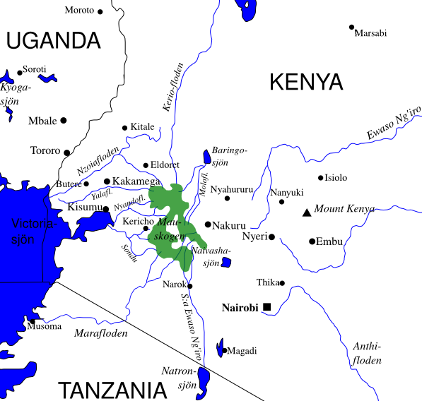 Mauskogen (Mau forest) i Rift Valley, Kenya, med större utgående floder.